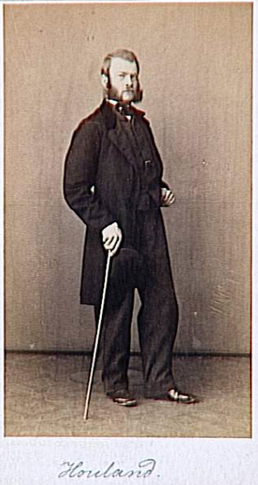 Fotografie von Holland (Alfred Cornelius Howland (12 February, 1838 – 17 March, 1909) was an American painter.), Arnold Overbeck, Gebr. G. & A. Overbeck in Düsseldorf